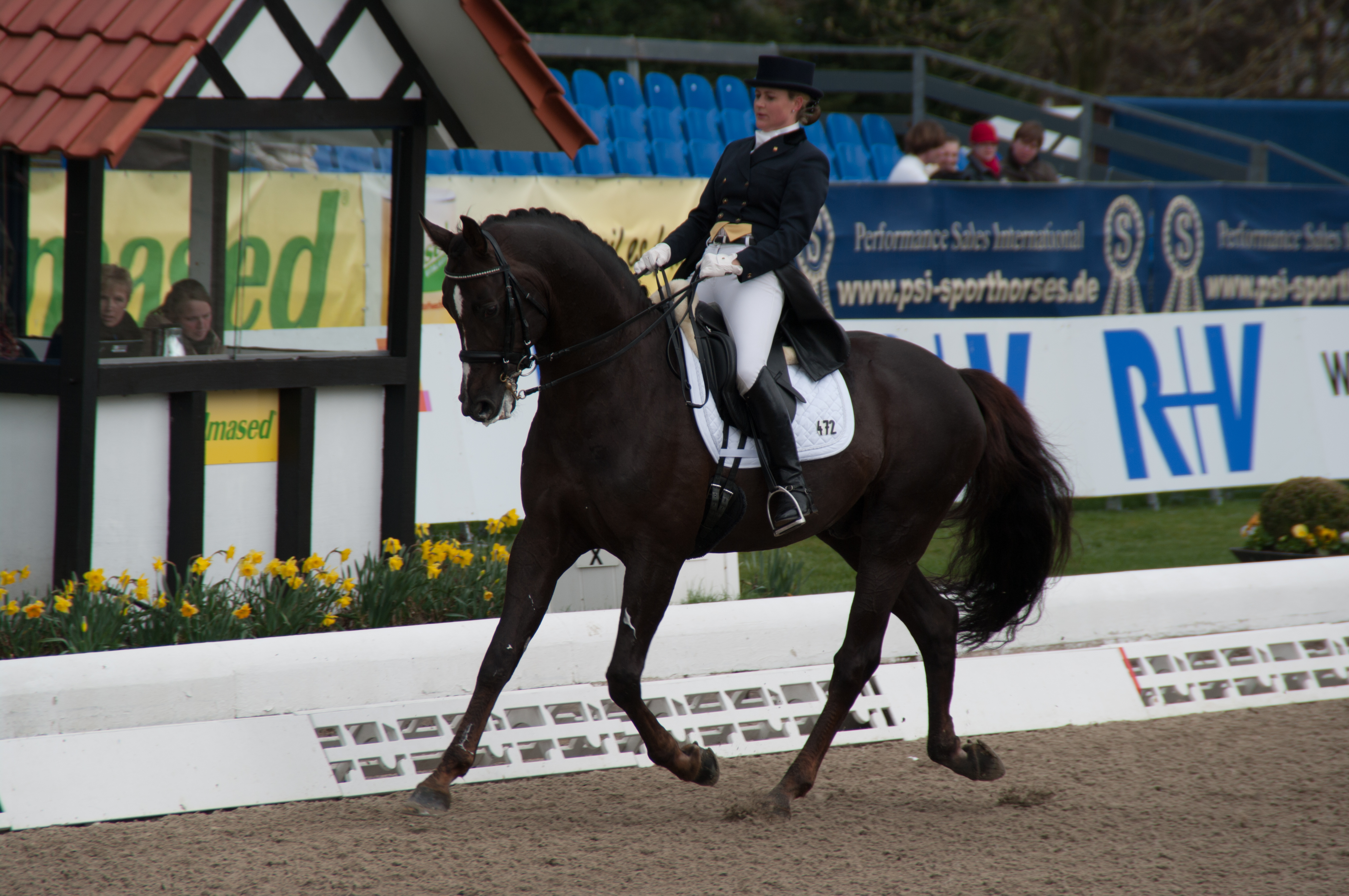 Horses & Dreams 2013: Die südafrikanische Dressurreiterin Tanya Karen Seymour mit Ramoneur